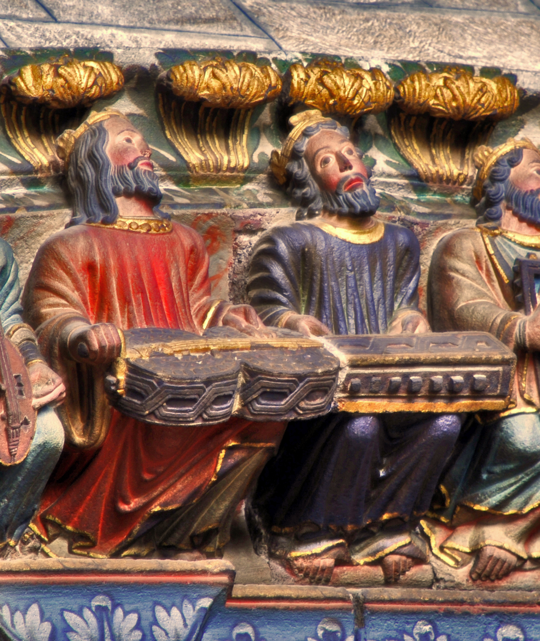 Organistrum de Catedral de Ourense (España), s XII, Pórtico del Paraíso, dovelas 11-12